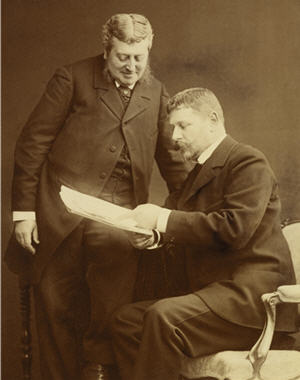 Les avocats du procès de Rennes - Affaire Dreyfus. Edgar Demange (1841-1925) est debout à côté de Fernand Labori (1860-1917).